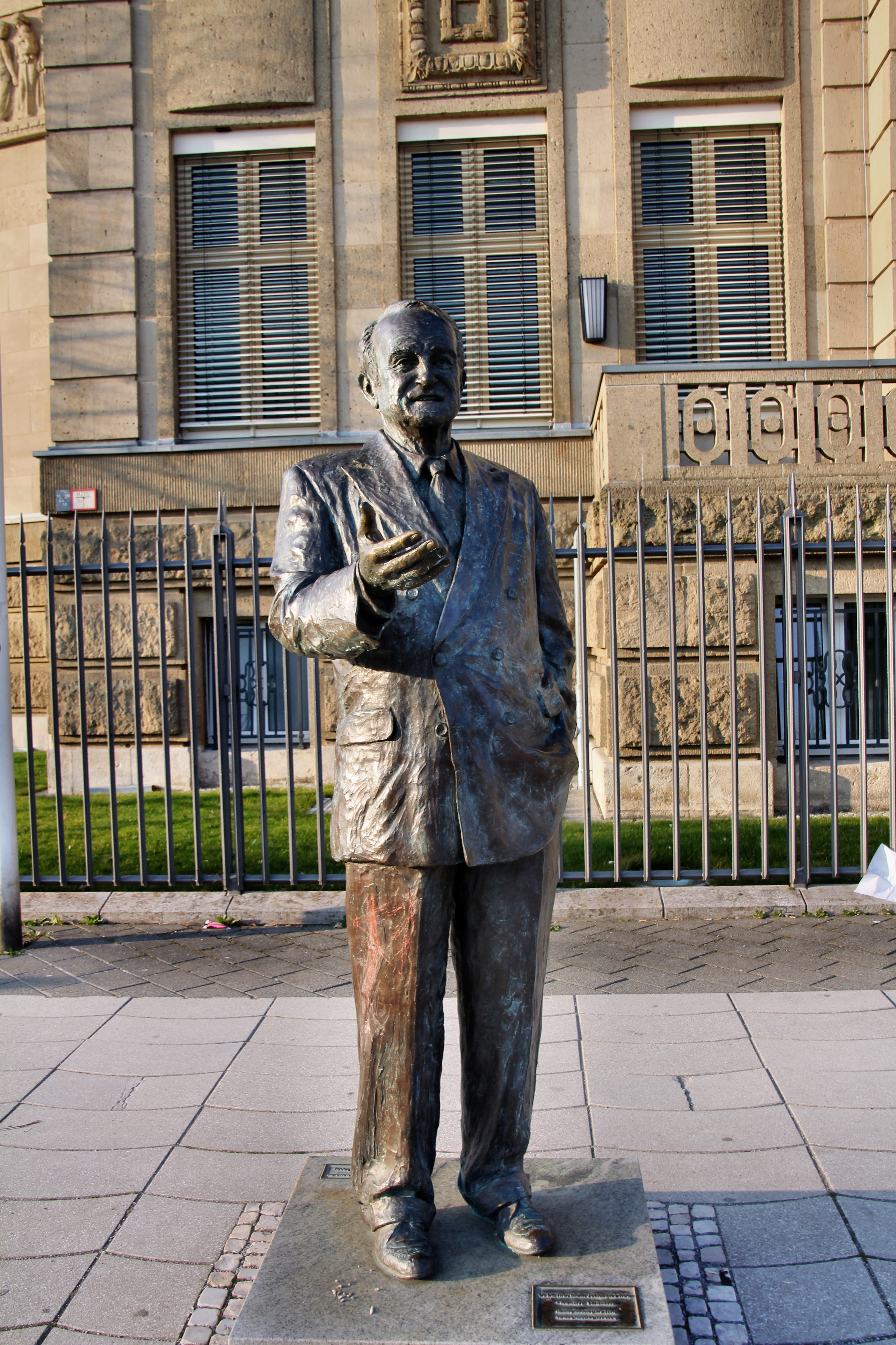 Statue des Bundespräsidenten Johannes Rau vor der Villa Horion in Düsseldorf